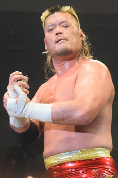 2016年2月11日 大阪府立体育会館 「THE NEW BEGINNING in OSAKA」 天山広吉